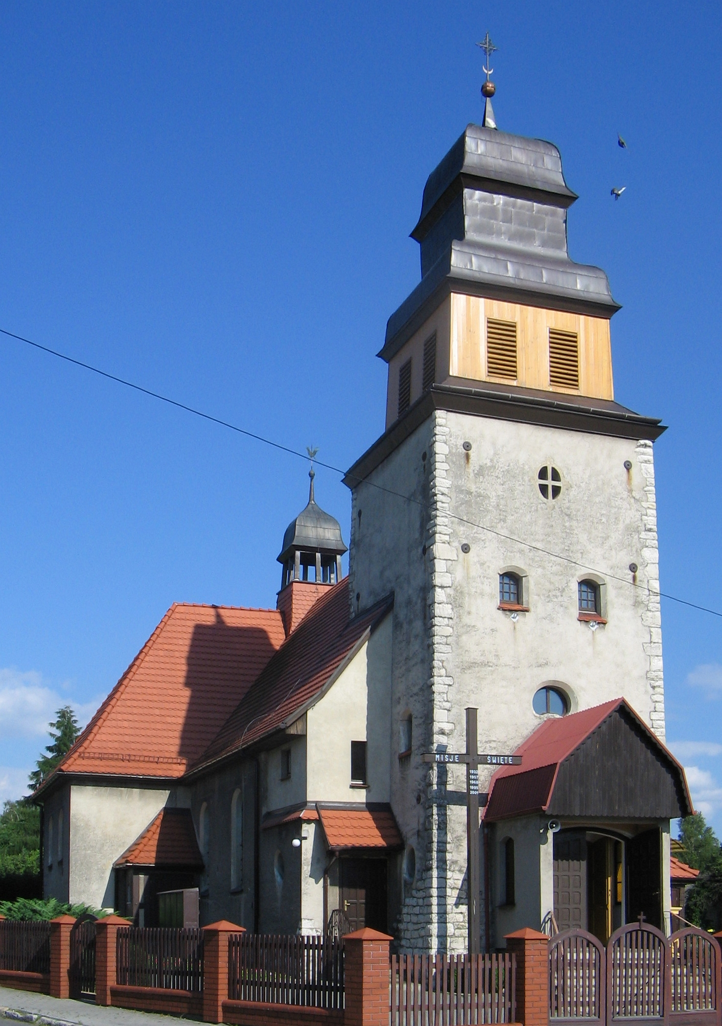 Church in Raszczyce, Poland, built in 1911